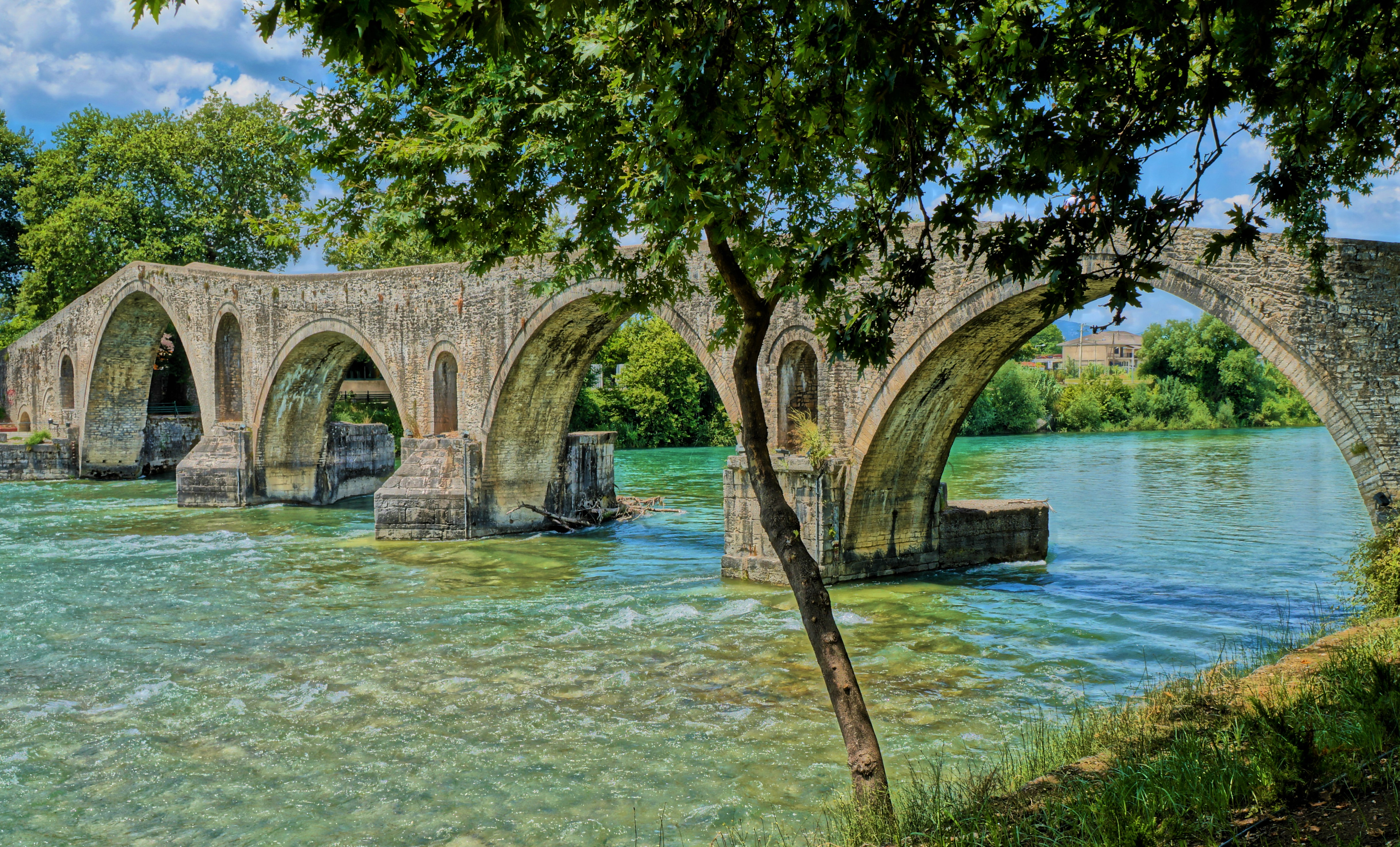 Άποψη του γεφυριού κατά τους θερινούς μήνες, με το ποτάμι ανοιχτό.«Γεφύρι της Άρτας»